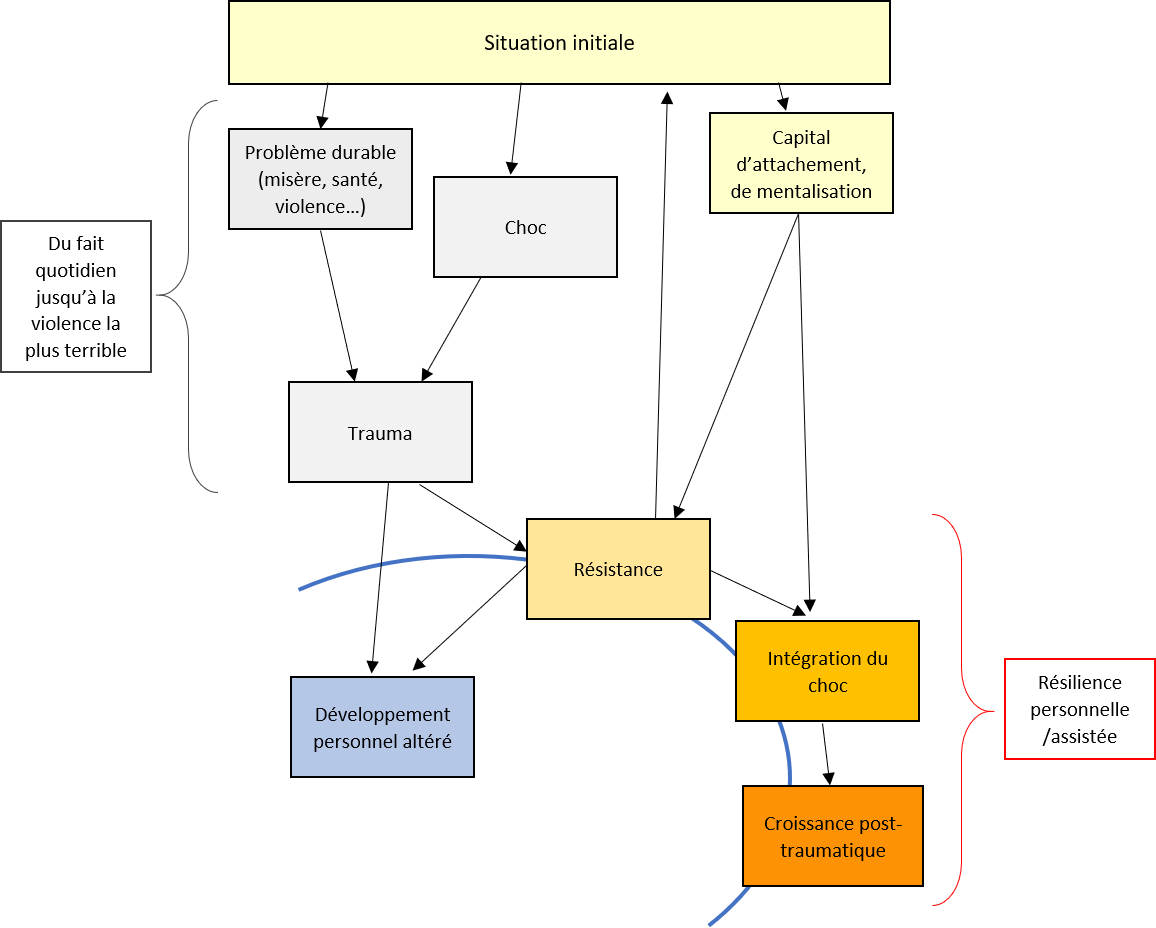 Schéma présentant le mécanisme qui mène d'un problème à la résilience, au travers de ses différentes formes ou étapes, et avec une part d'altération du projet de vie initial.